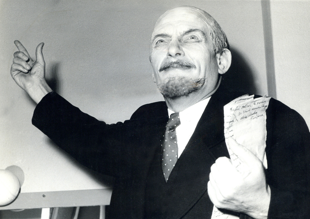 Vsevolod Vitaljevič Višnevski, Optimistična tragedija, Drama SNG v Ljubljani. Na fotografiji: Maks Furijan (Lenin).